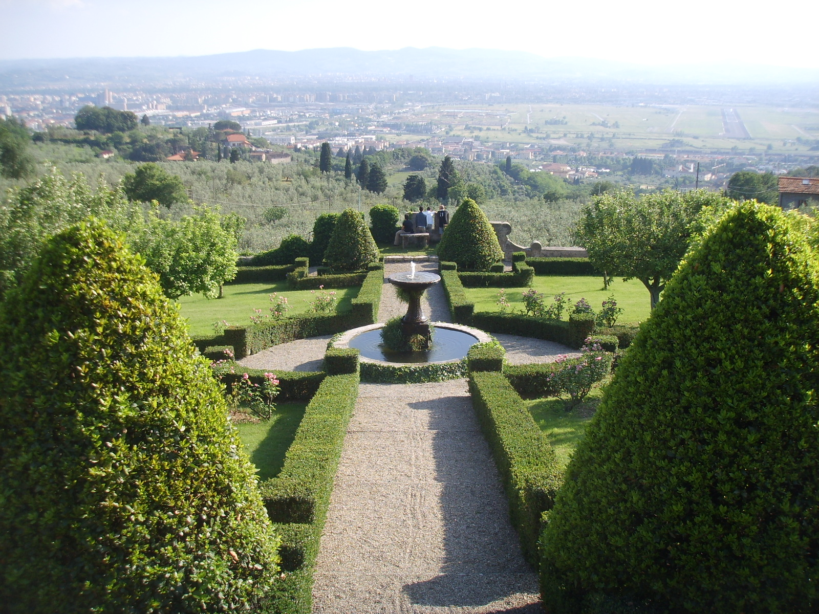 Villa il casale, giardino